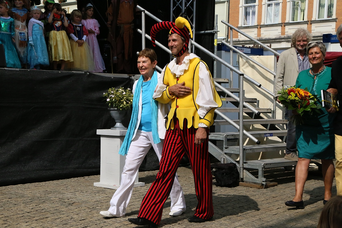 Christel Bodenstein beim Filmfestival Fabulix